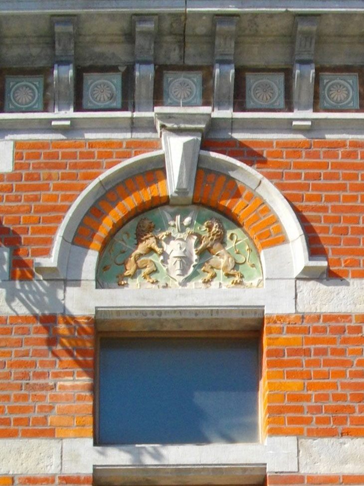 Écussons placés sur la gare de Jemapes